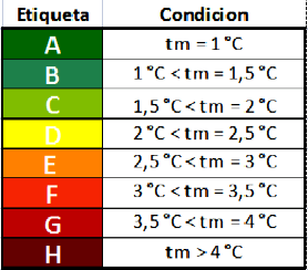 Tabla con valores admisibles de tau para cada categoría energética de edificio